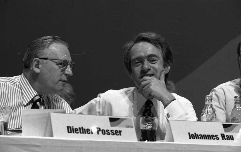 Außerordentlicher Parteitag der SPD in der Westfalenhalle Dortmund, 18.-19.6.1976